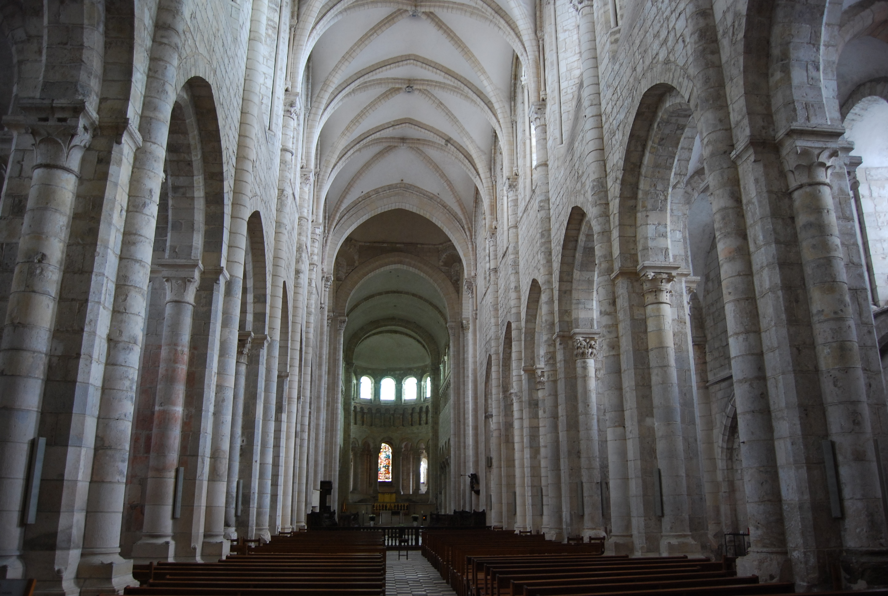 Navata